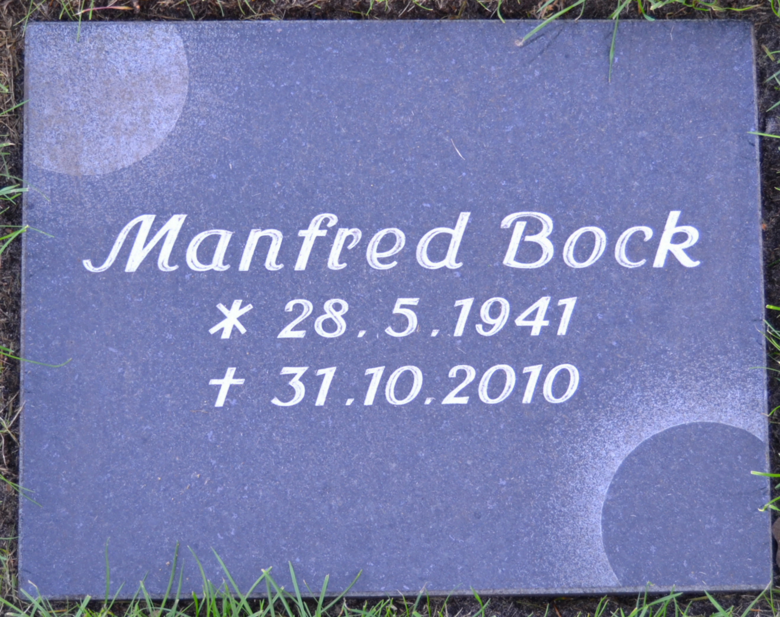 Grabstein von Manfred Bock (* 28. Mai 1941 in Hamburg; † 31. Oktober 2010 in Uetersen) Manfred Bock war ein deutscher Leichtathlet, Zehnkämpfer und Olympiateilnehmer bei den Olympischen Spielen 1960.